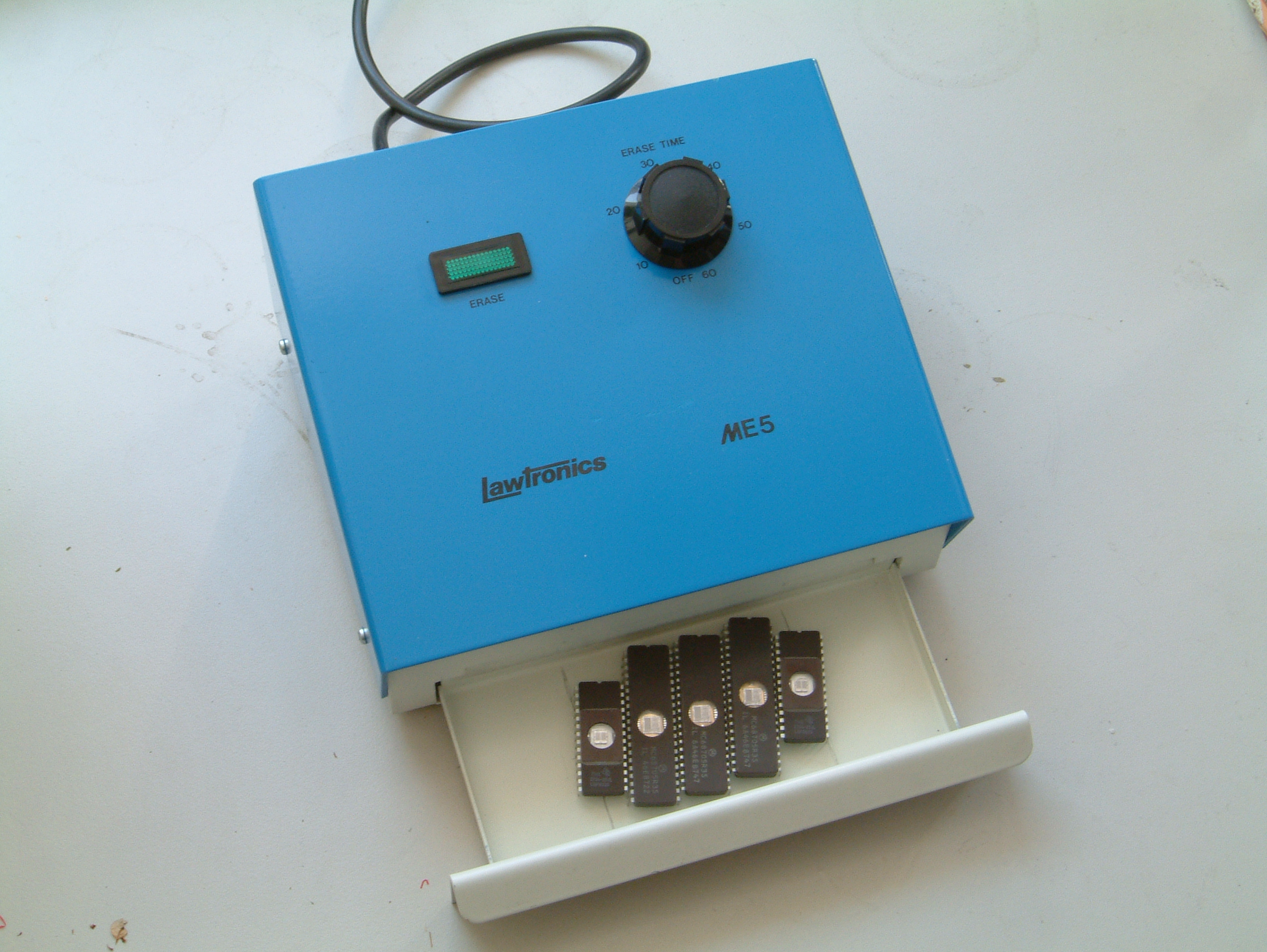 EPROM UV eraser